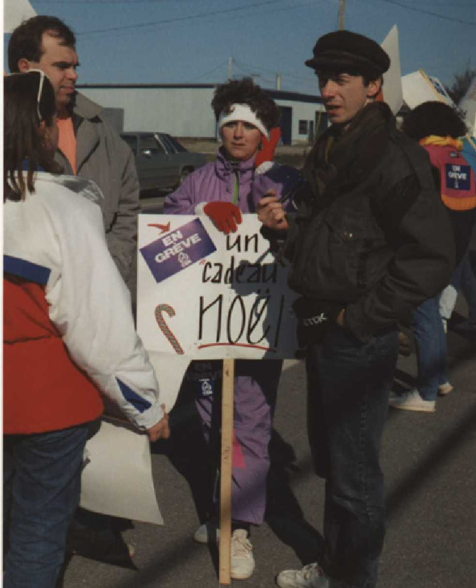 Martin Pître (à droite sur la photo) lors de la grève des travailleurs de L'Acadie Nouvelle en octobre 1990. Photo: collection personnelle, Marie-Claire Pitre